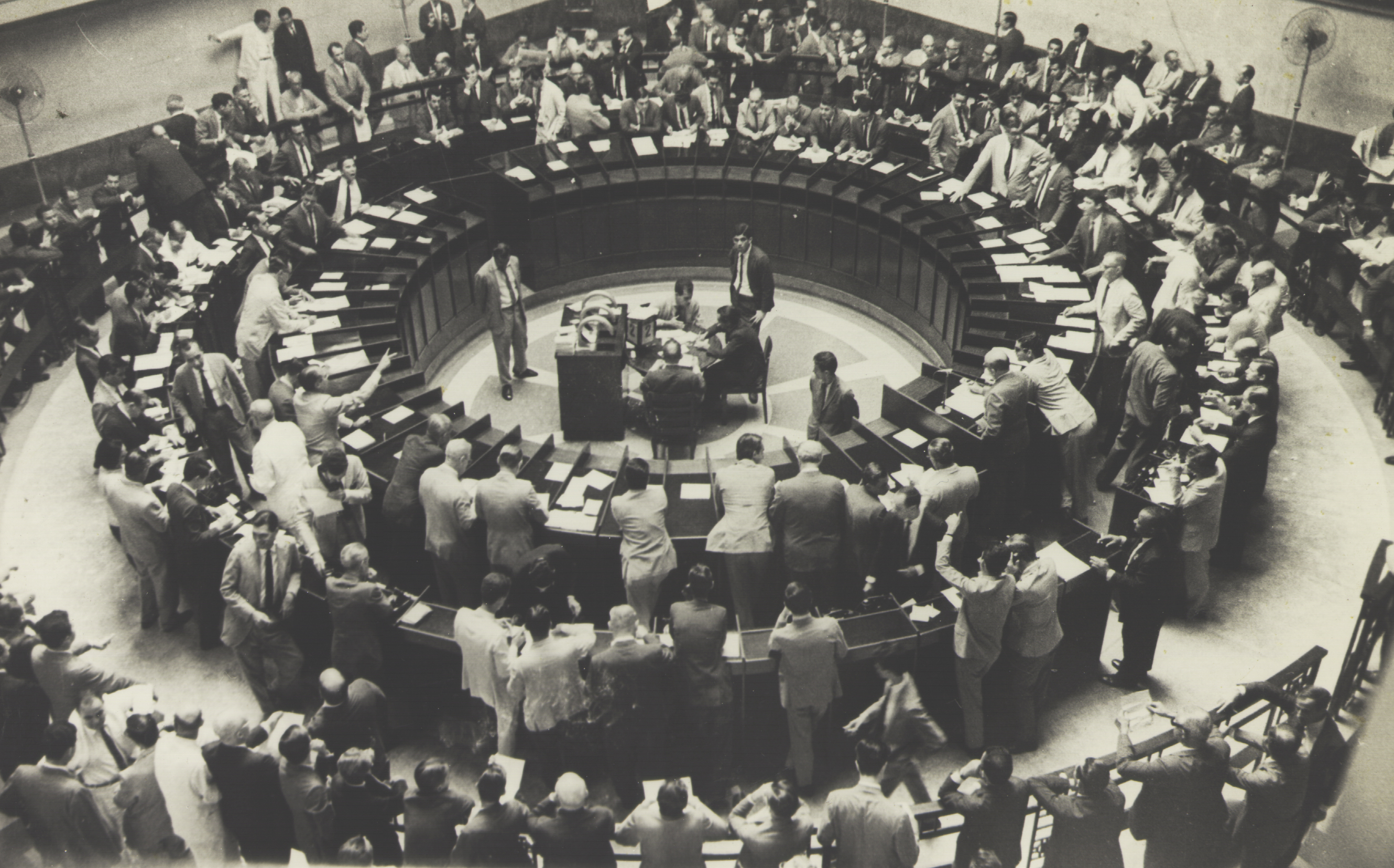 Obra que integra o acervo do Museu Paulista da USP. Coleção Werner Haberkorn